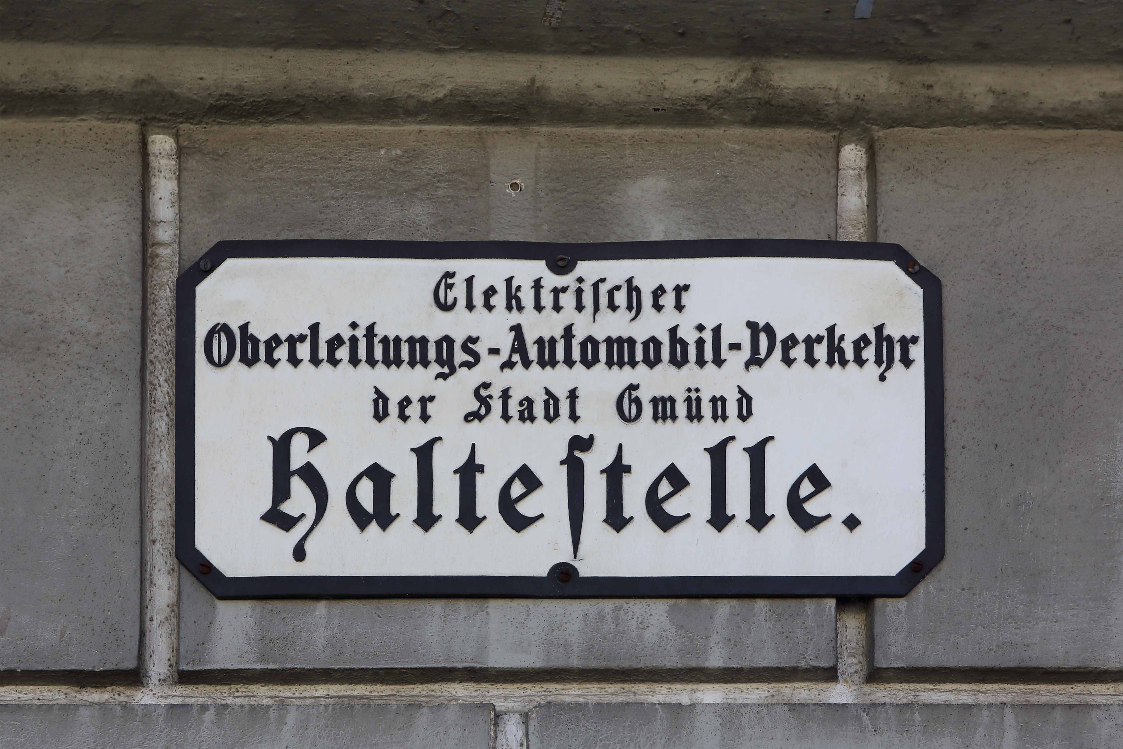 Von 1907 bis 1916 verkehrte ein Oberleitungsbus zwischen dem Hauptplatz und dem damaligen Bahnhof von Gmünd (heute in České Velenice).